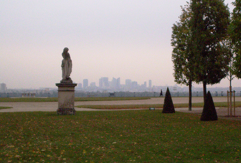 vue sur Paris - La Défense, parc du Château